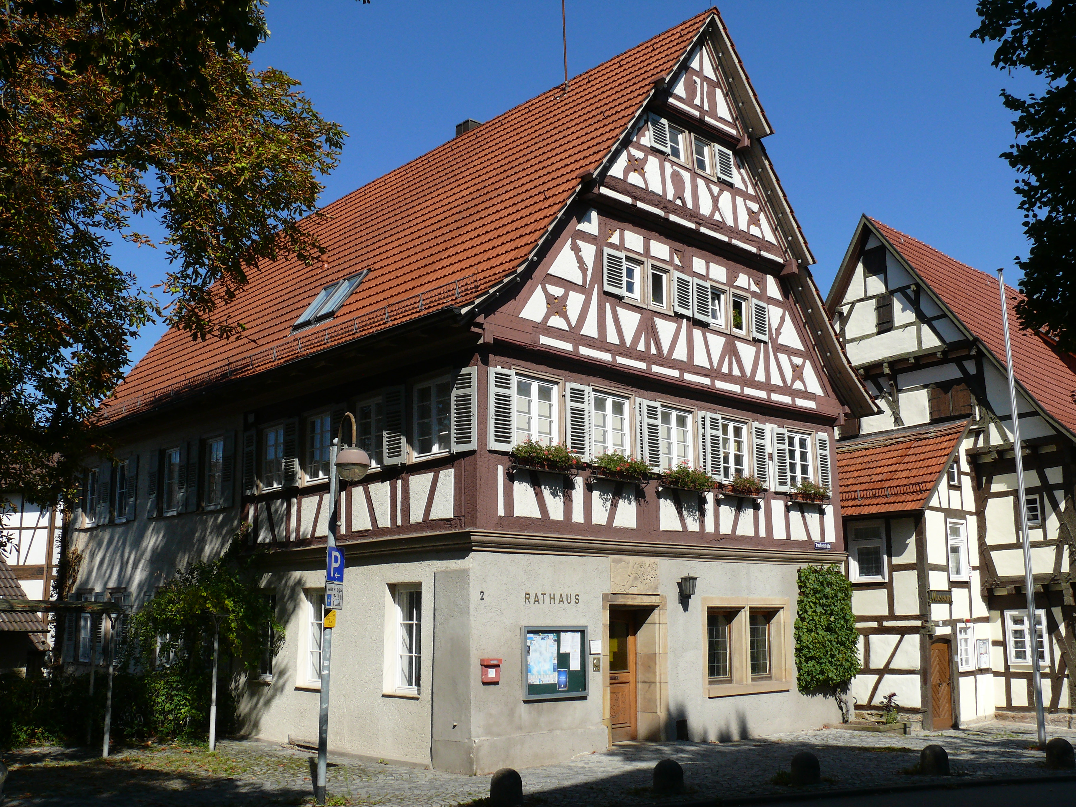 Das historische Rathaus in Weinstadt-Endersbach.